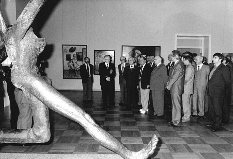 ADN-ZB Settnik 3.10.87 pe-Dresden: X. Kunstausstellung der DDR Erich Honecker, Generalsekretär des ZK der SED und Vorsitzender des Staatsrates, und weitere Mitglieder der Partei- und Staatsführung waren Ehrengäste der Eröffnung der X. Kunstausstellung. Im Albertinum sahen sie u.a. die überdimensionale Plastik "Der Jahrhundertschritt" von Prof. Wolfgang Mattheuer.